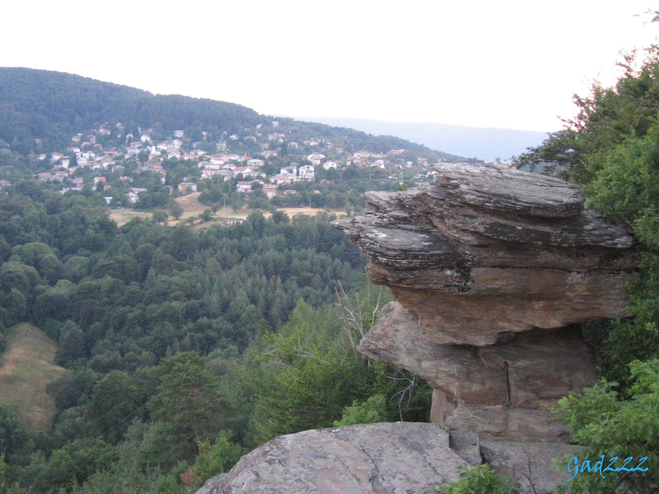 Село Бойково от близките скали.